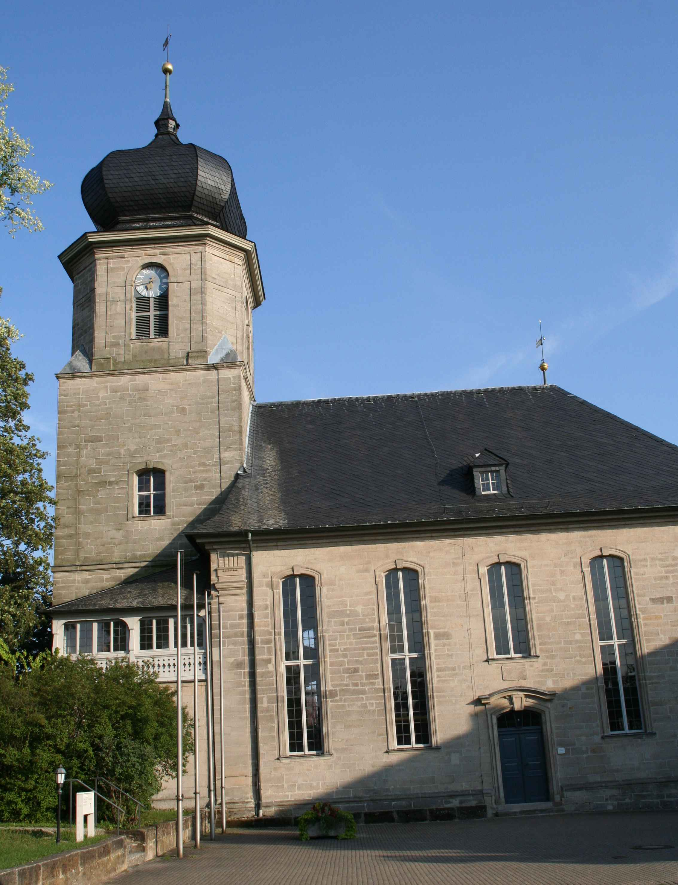 ev. Kirche Unterlauter evangelische Kirche in Unterlauter, OT von Lautertal, Landkreis Coburg